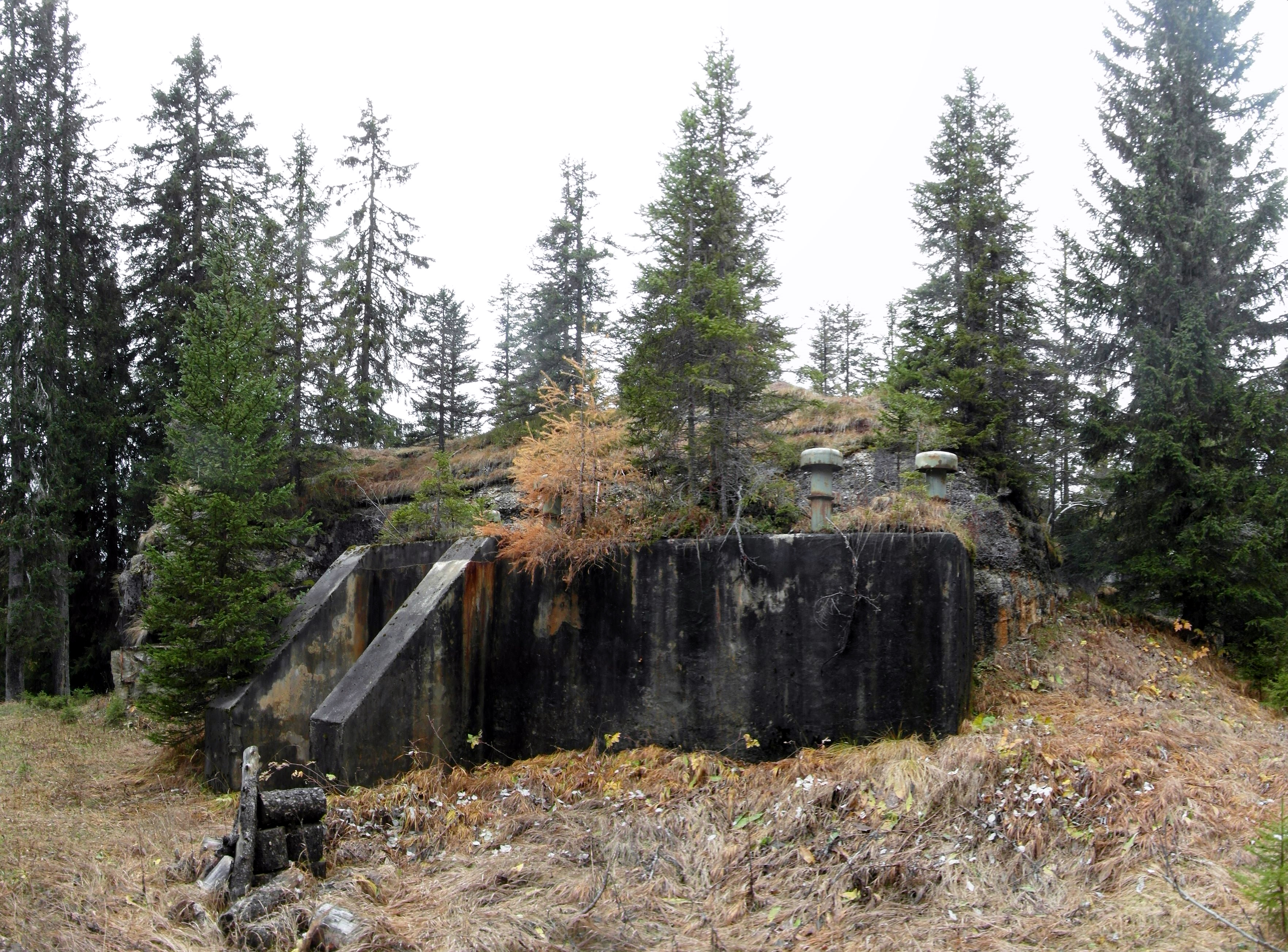 Opera 5 Passo Monte Croce di Comelico